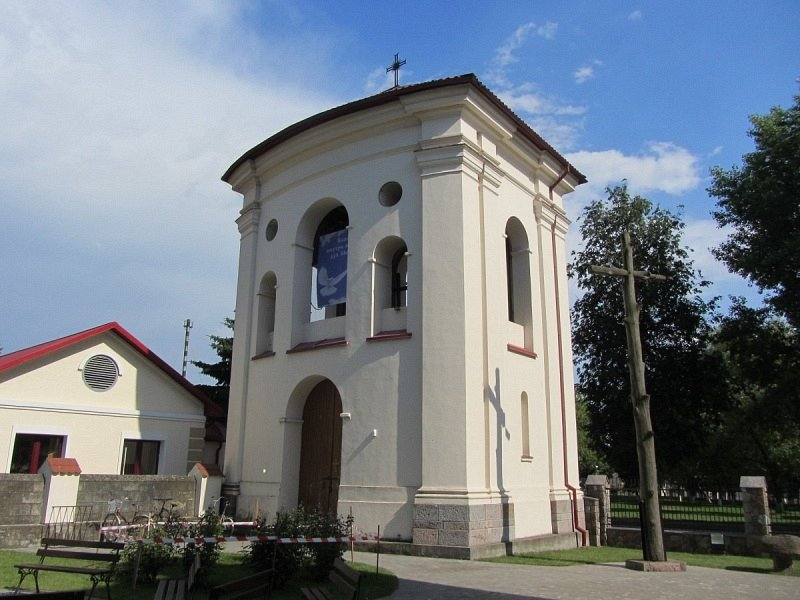 Рось. Касцёл Найсвяцейшай Тройцы. Брама-званіца